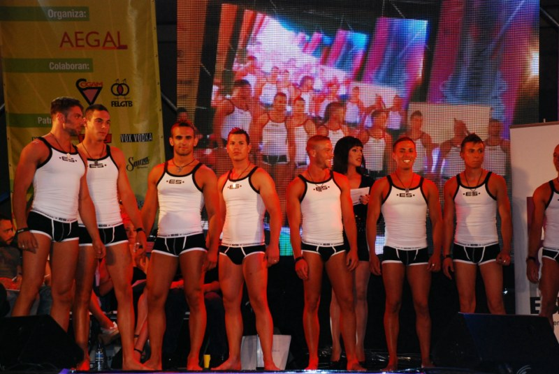 Candidatos 2009